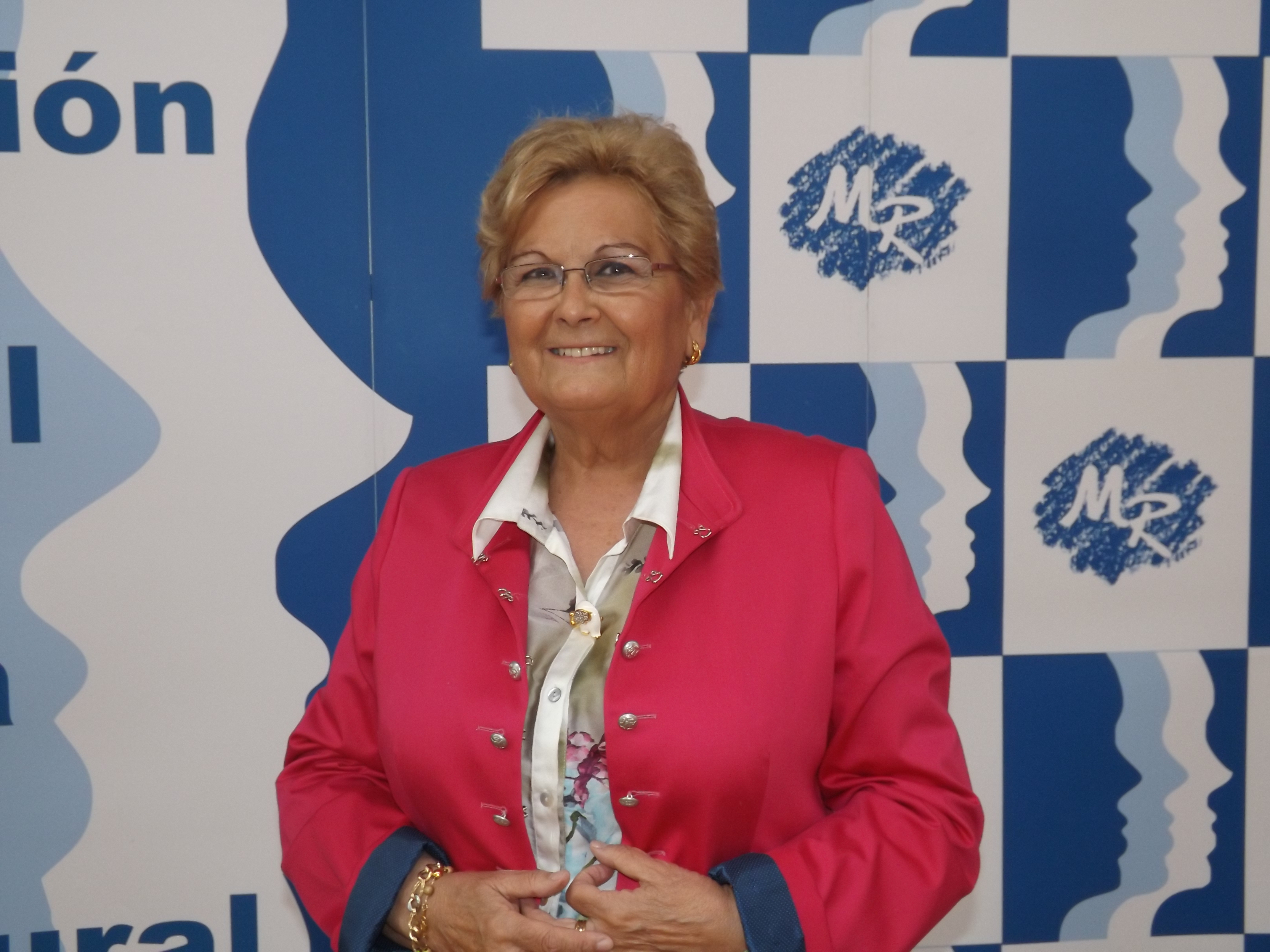 Juana Borrego Izquierdo